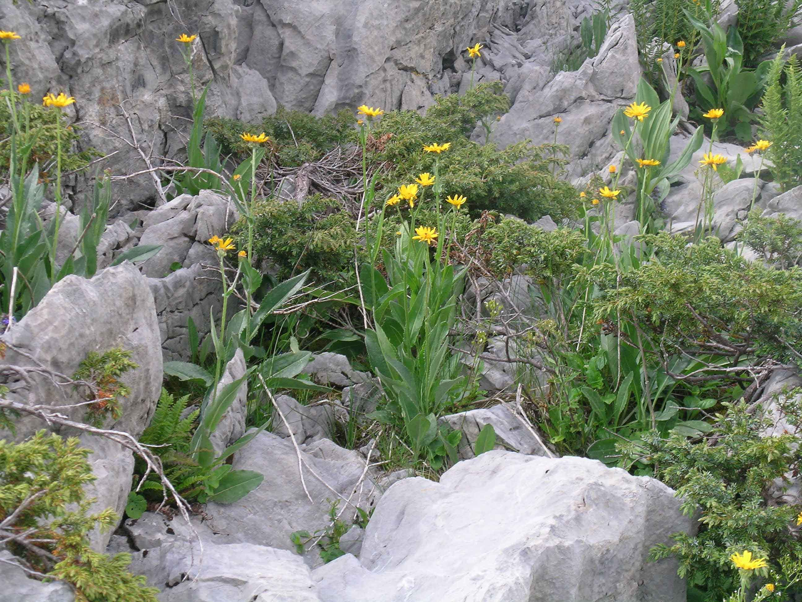 Senecio doronicum, Schynige Platte, Kanton Bern, Schweiz